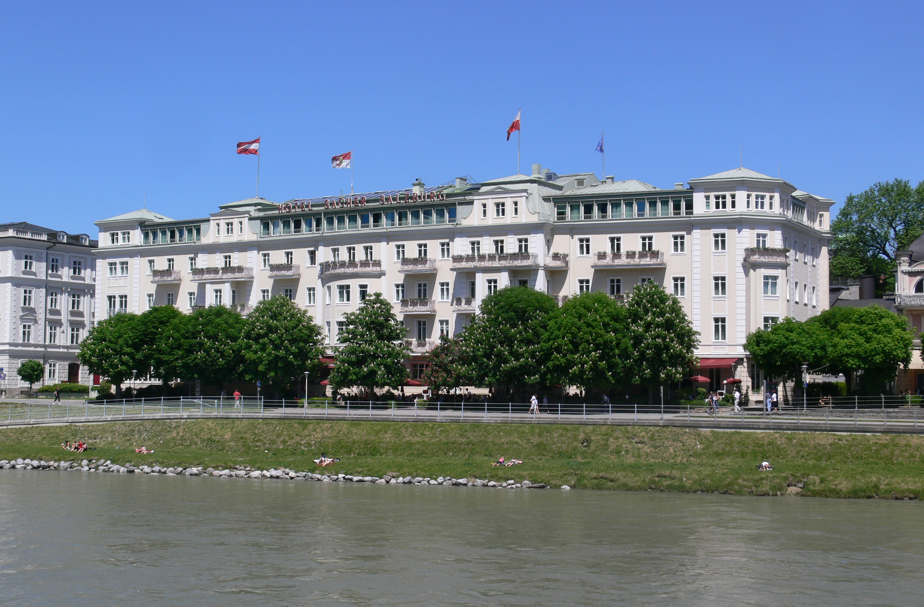 Hotel Sacher Salzburg, Elisabethkai